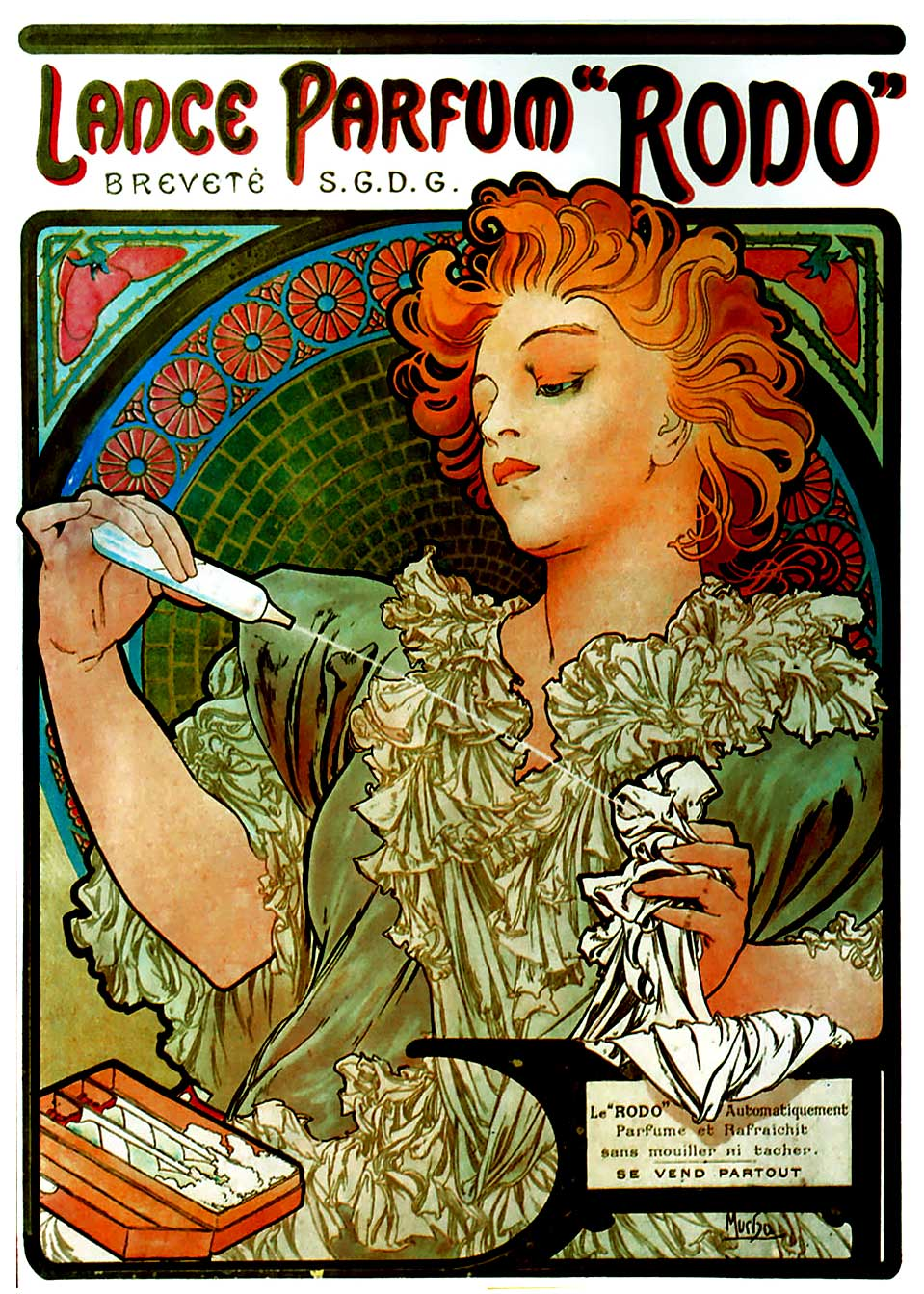 Affiche: Lance Parfum Rodo